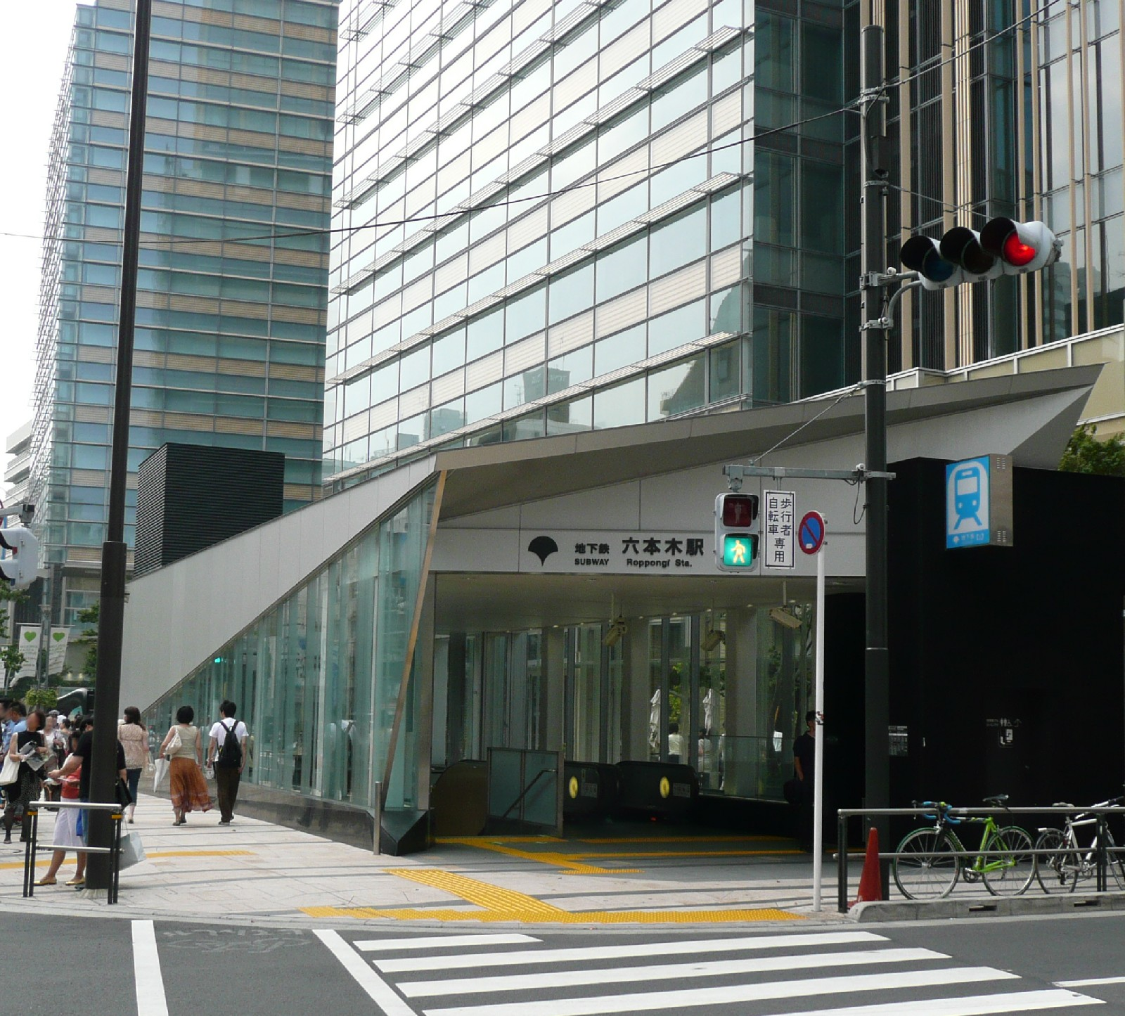 六本木駅7番出入口